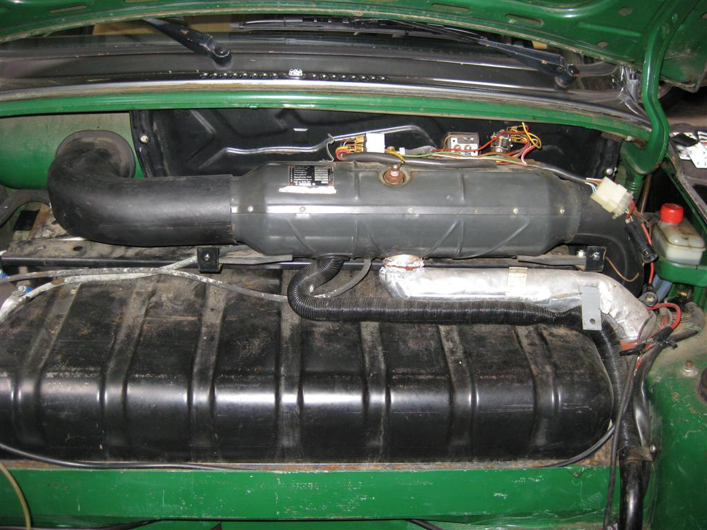 Eberspacher BN2 standkachel in een Volkswagen kever 1303.